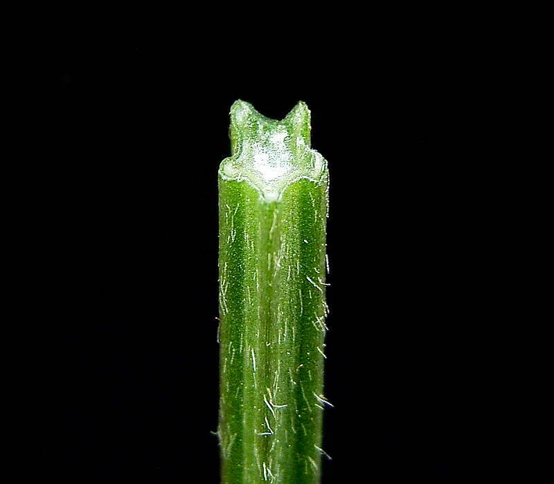 Plantago lanceolata Inflorescence stalk